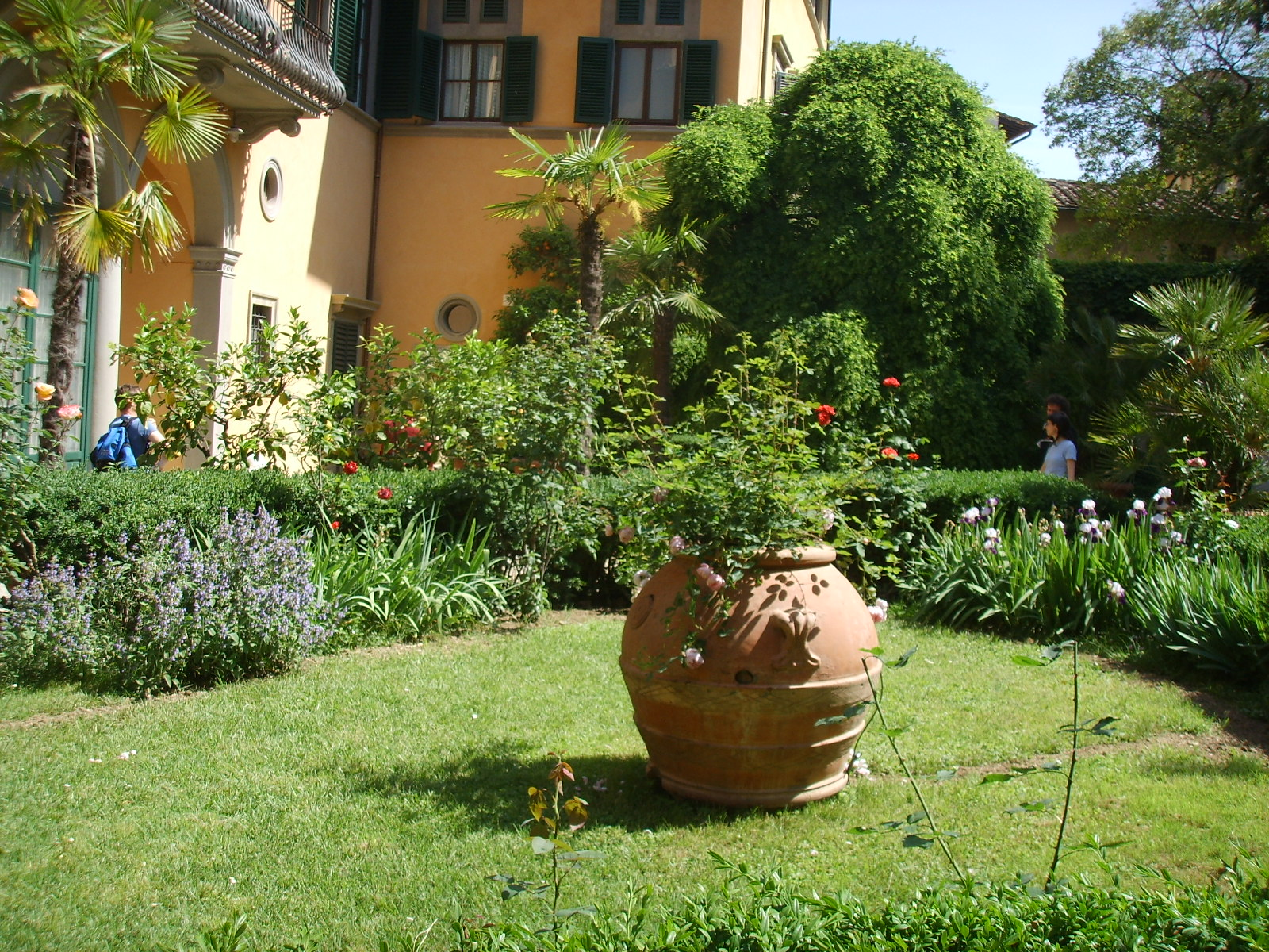 Palazzo guicciardini, giardino